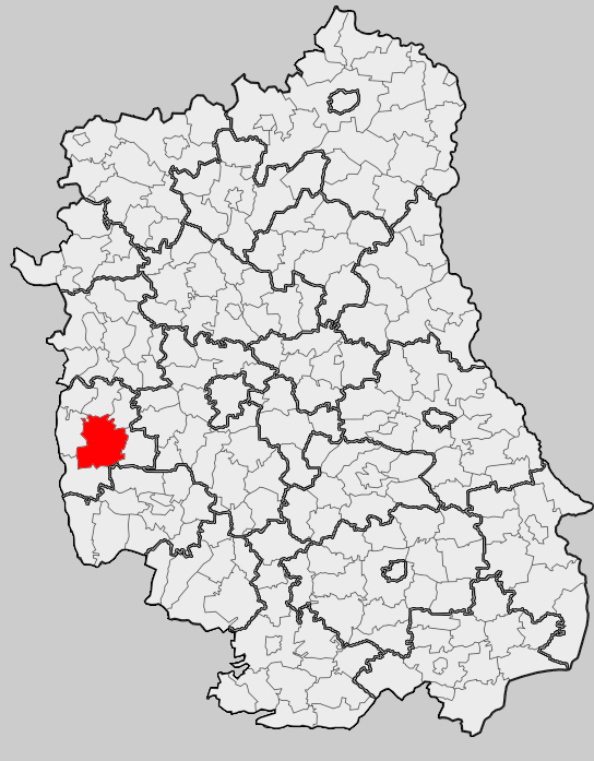 Map of gmina Opole Lubelskie, Opole Lubelskie county, Lublin voivodship Mapa gminy Opole Lubelskie, powiat opolski, województwo lubelskie